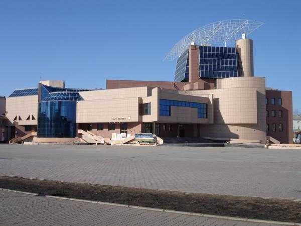 Якутский академический драматический театр им. П. А. Ойунского, г. Якутск